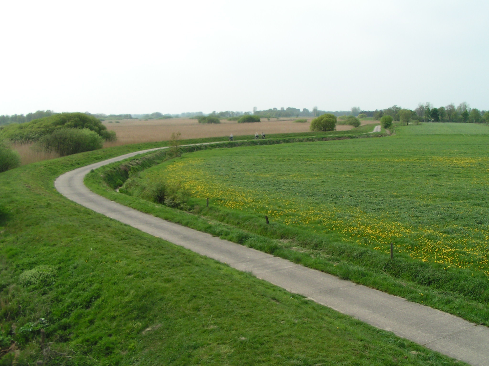 Ausblick vom Landschaftsfenster Tange